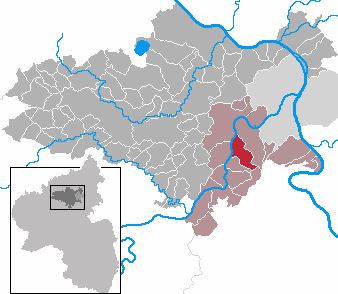 Niederfell in Rhineland-Palatinate - district Mayen-Koblenz